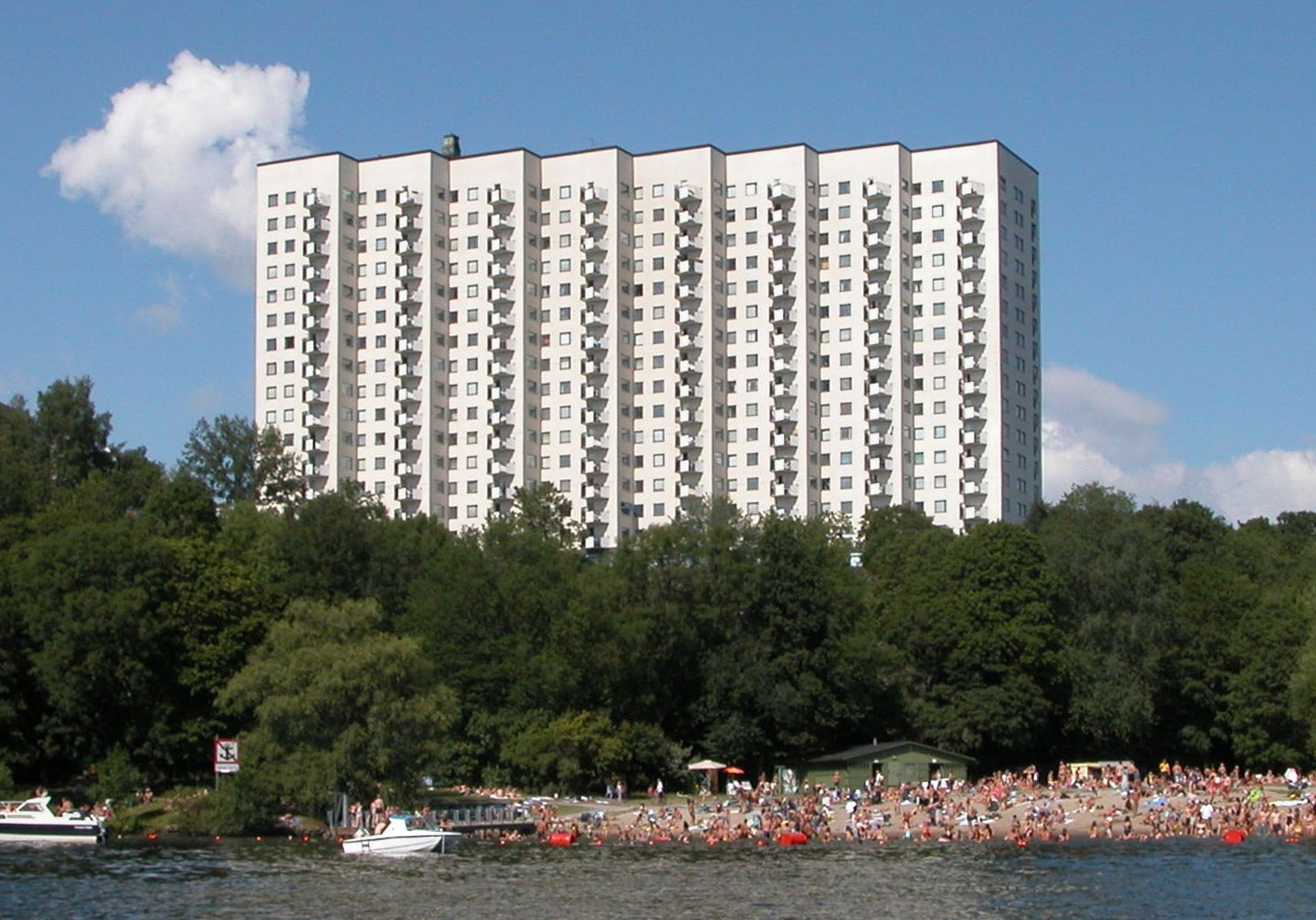 Lysbomben från söder, med Smedsuddsbadet i förgrunden.